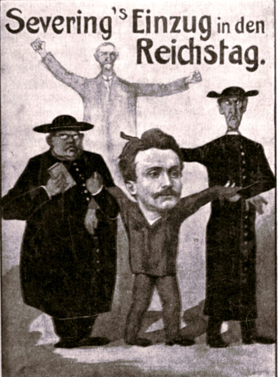 Postkarte der bürgerlichen Parteien zur Wahl von Carl Severing in den Reichstag